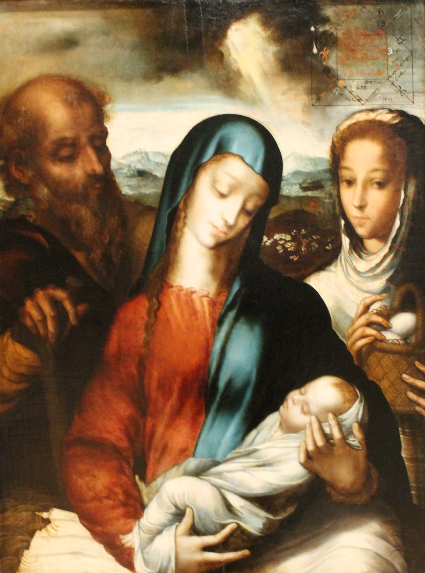 La sagrada familia con el horóscopo de Cristo (c. 1560), de Luis de Morales, el Divino (1511-1586). Óleo sobre madera. Museo Metropolitano de Arte. Nueva York (Estados Unidos).